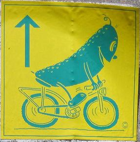 Gurkenradweg_Symbol_AK